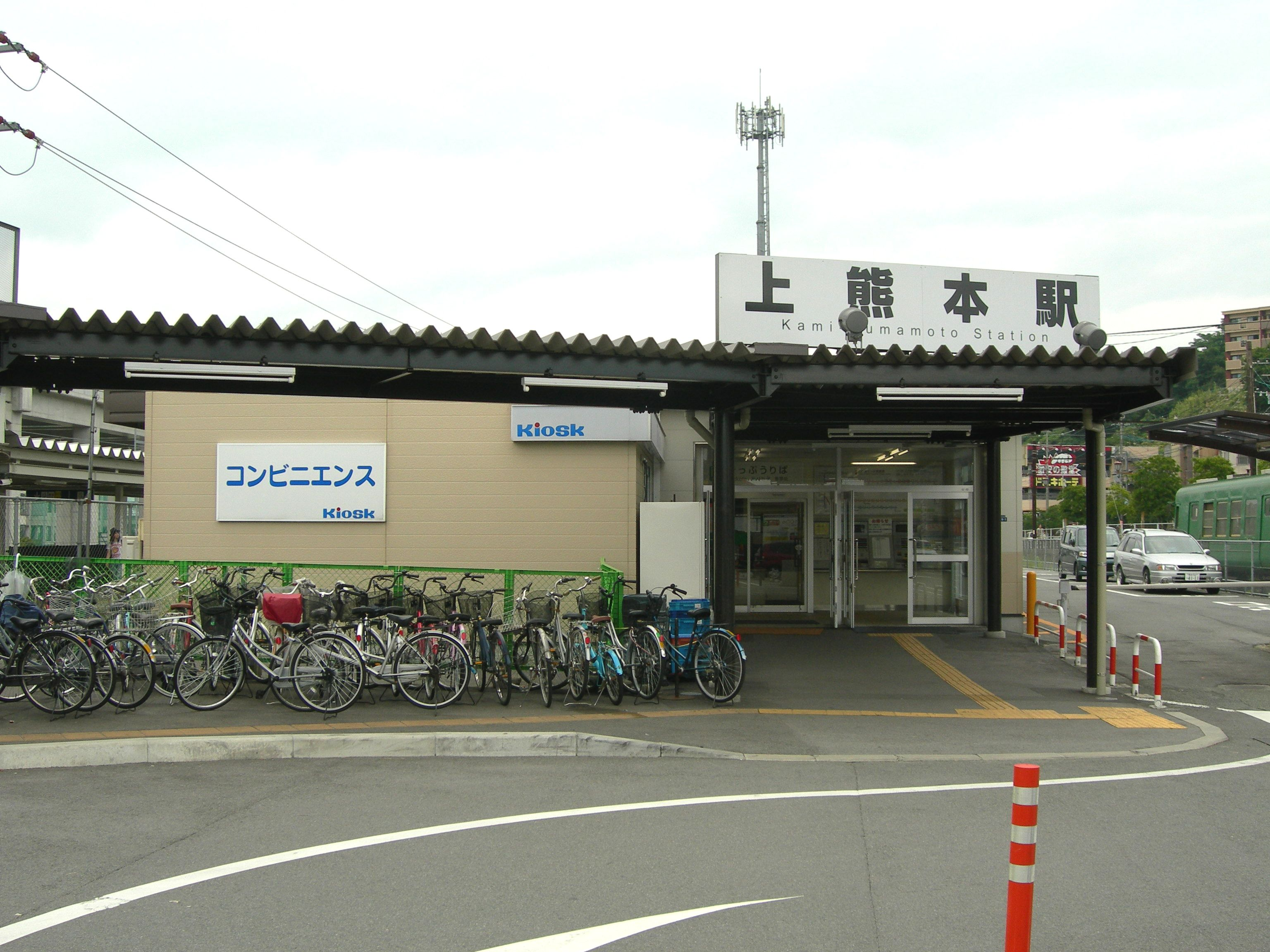 上熊本駅